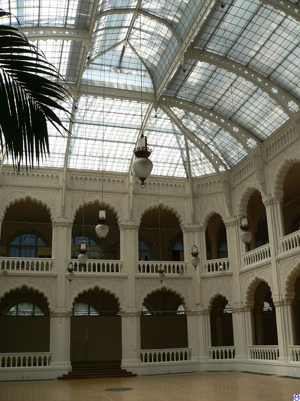 Budapest: Halle im Kunstgewerbemuseum (5.2006) Architekt: Ödön Lechner